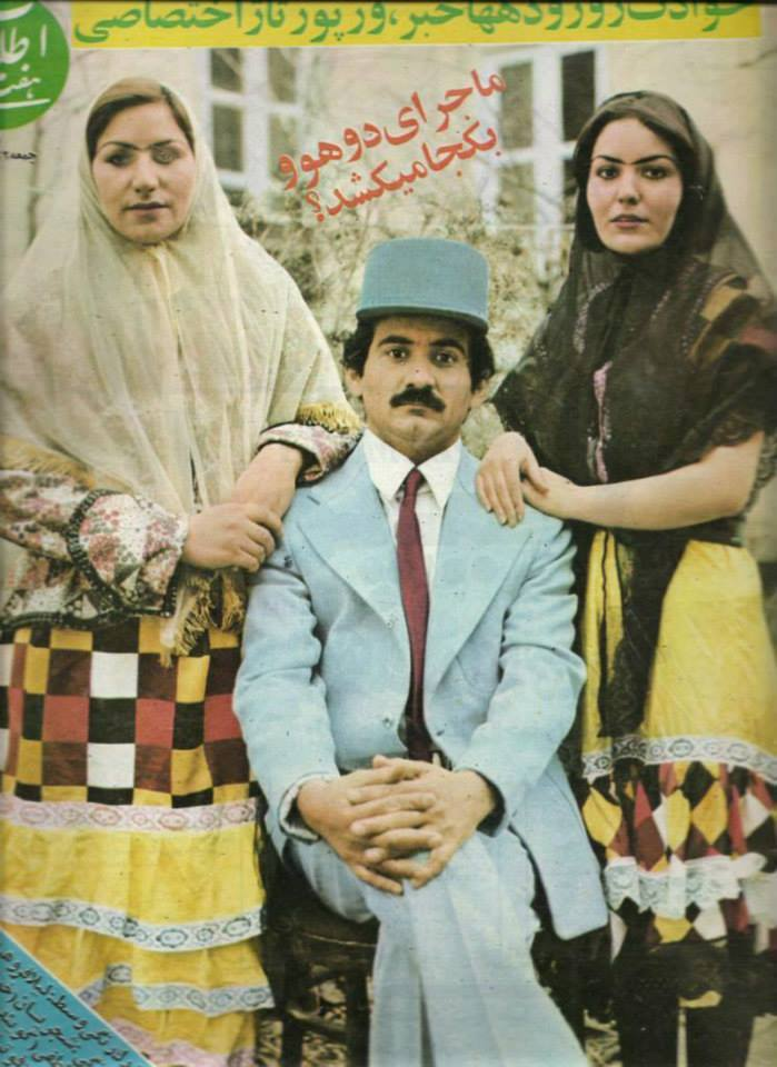 سریال مرد اول